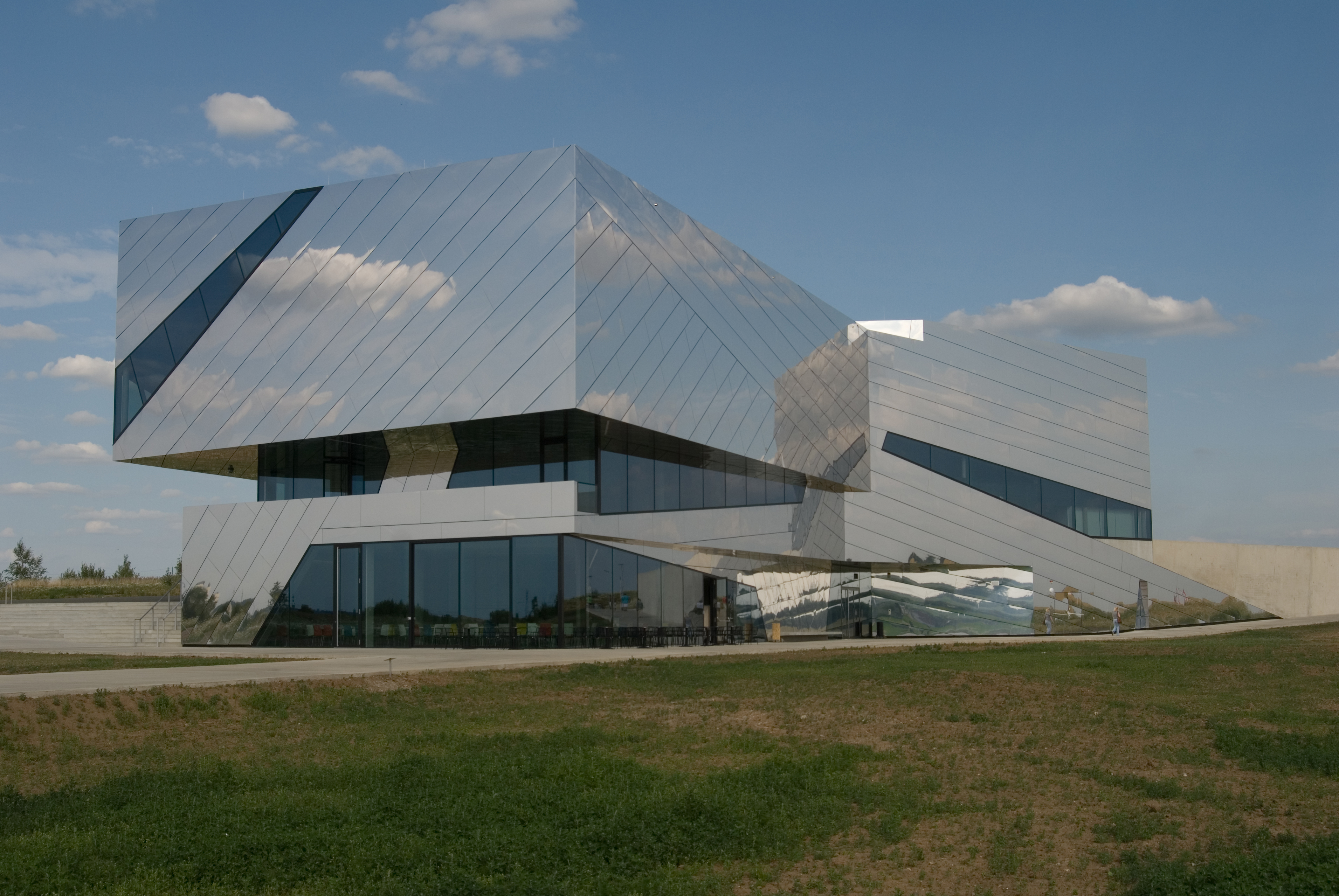 fertiggestelltes Speere Museum (Paläon)